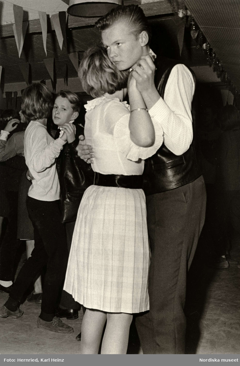 Unga par på skoldans